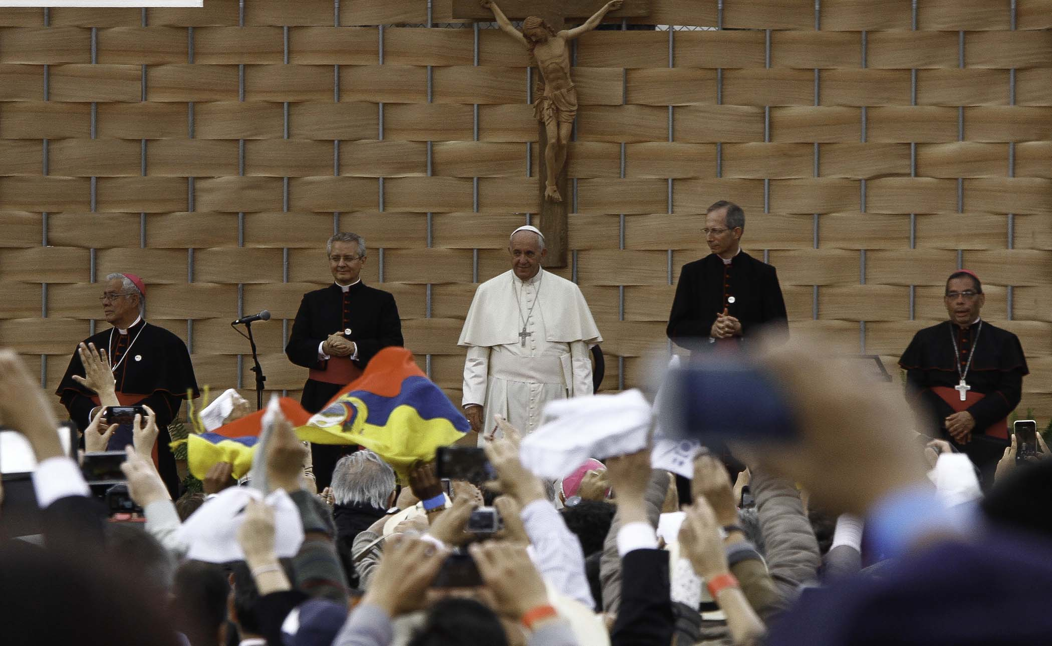 Quito, 07 jul (Andes).- El papa Francisco en su visita a Ecuador se reunió con estudiantes y profesores de la Pontificia Universidad Católica del Ecuador (PUCE). ANDES/Micaela Ayala V.